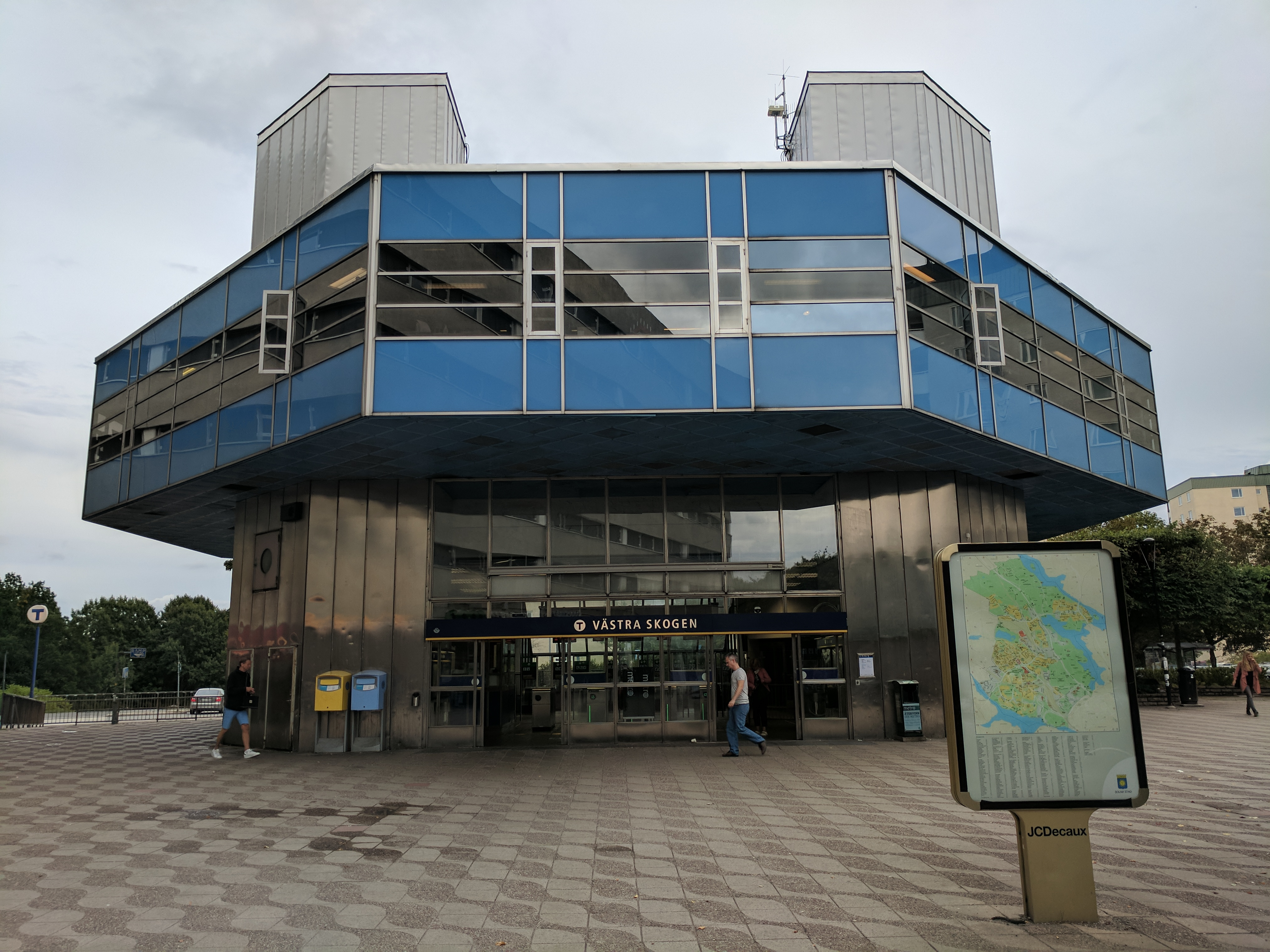 Västra skogen 20170902